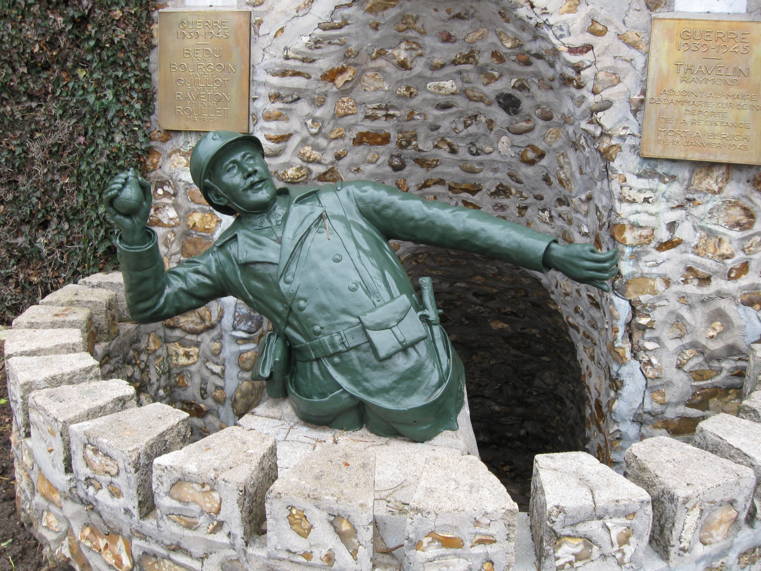 Dammarie-sur-Loing, détail du monument aux morts.